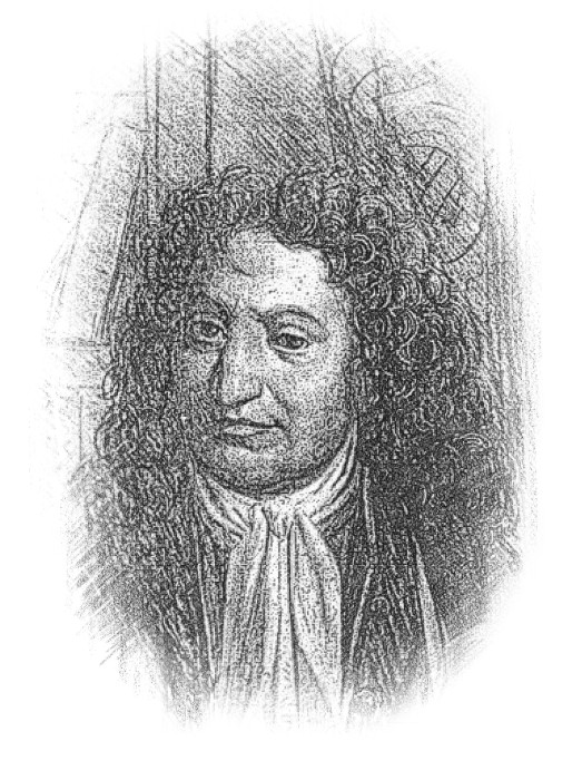 Célèbre poète et pamphlétaire français.